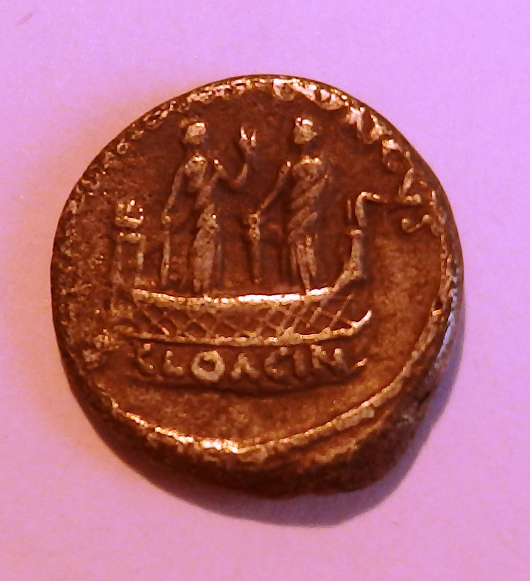 Tempel der Venus Cloacina auf römischen Denar, 42 v. Chr., Albert 1603